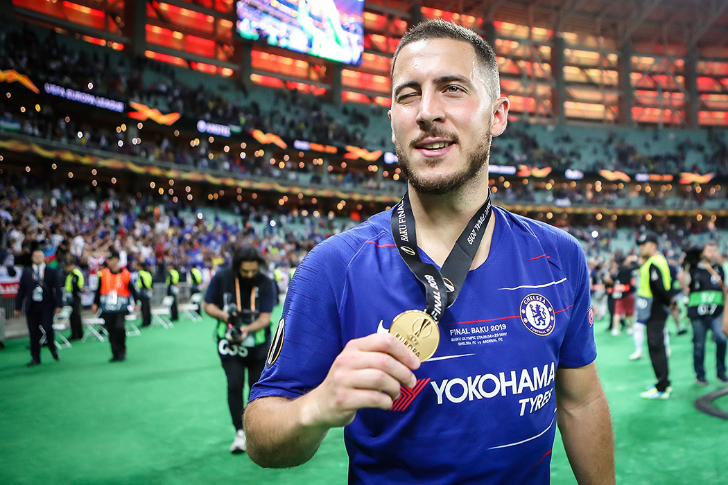 مسابقه چلسی و آرسنال، فینال لیگ اروپا ۲۰۱۹